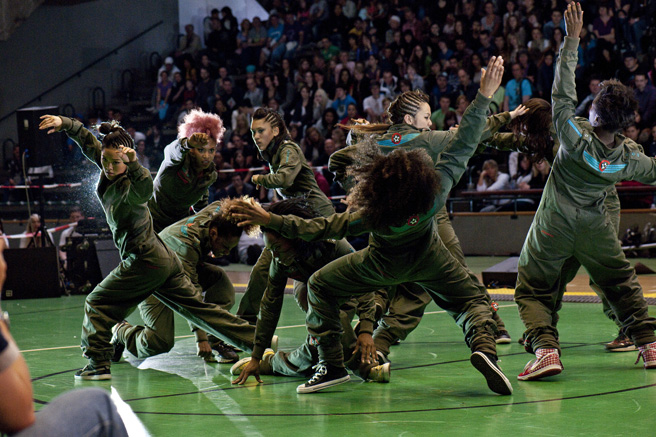 Street-Dance-Meisterschaft